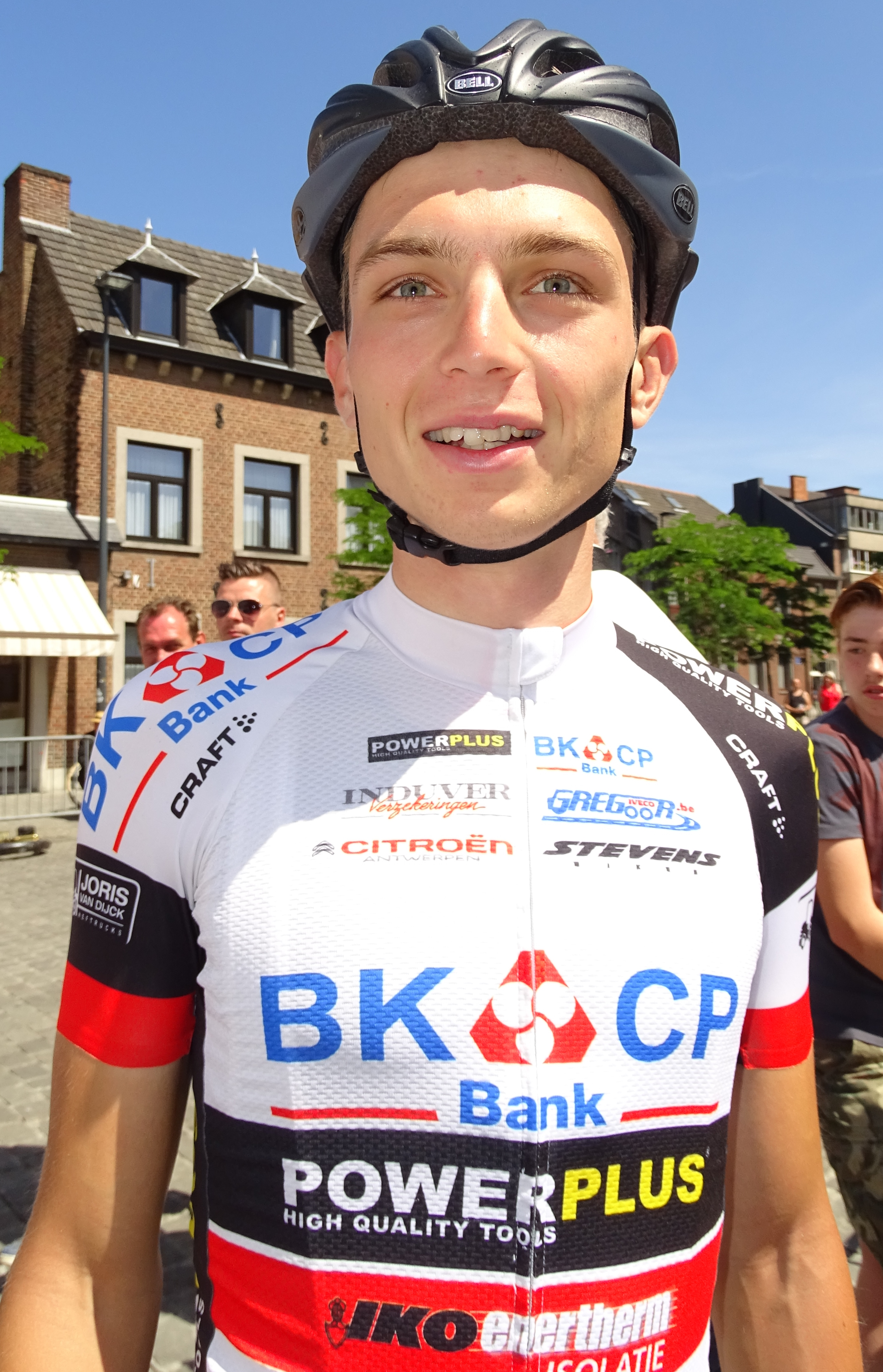 Reportage réalisé le dimanche 14 juin à l'occasion du départ et de l'arrivée du Tour du Limbourg 2015 à Tongres, Belgique.